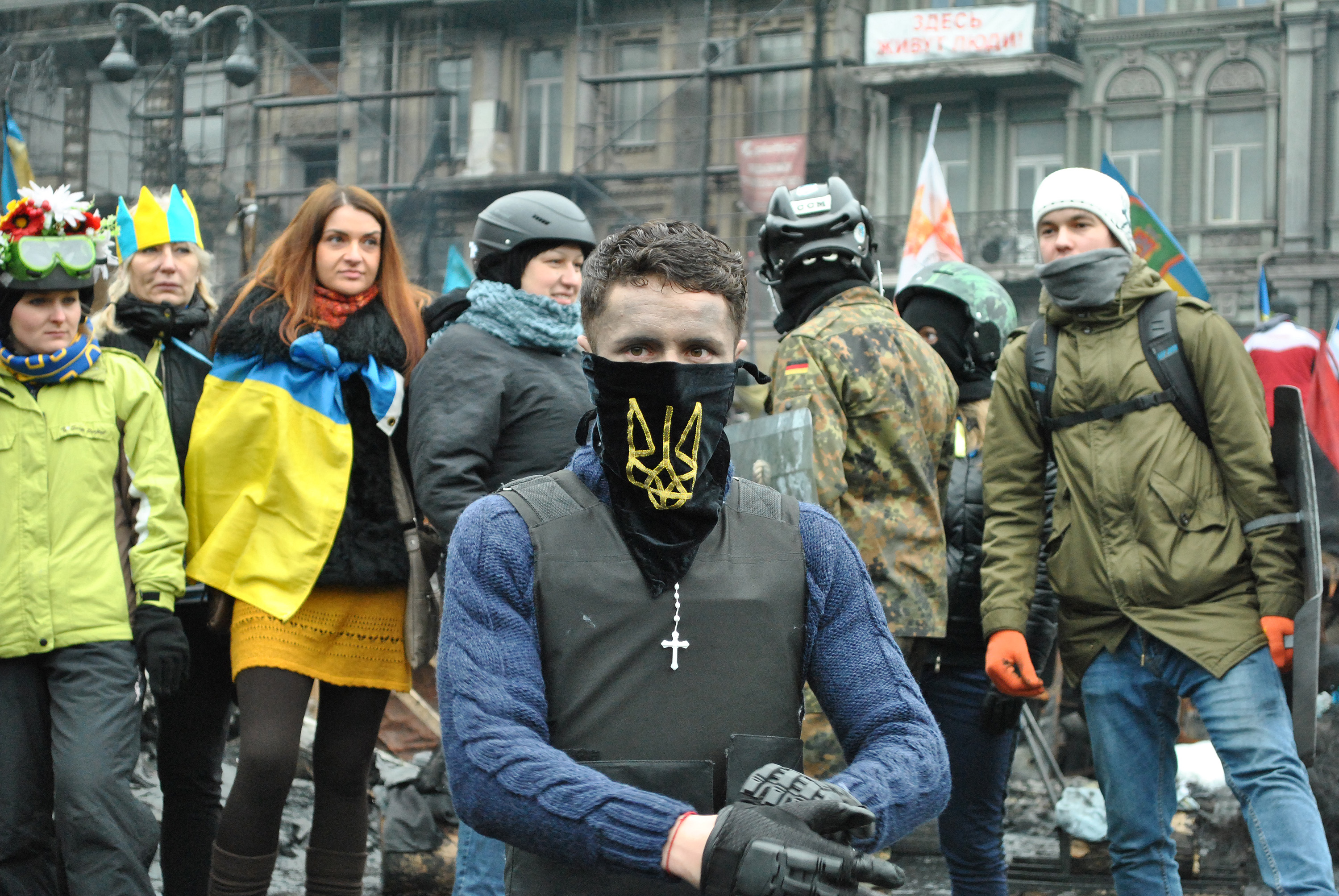 Український співак-репер, волонтер, автор пісні «Revolution Ukraine» Artisto (Ростислав Хитряк) під час запису відеокліпу на вулиці Михайла Грушевського в Києві 16 лютого 2014 року.